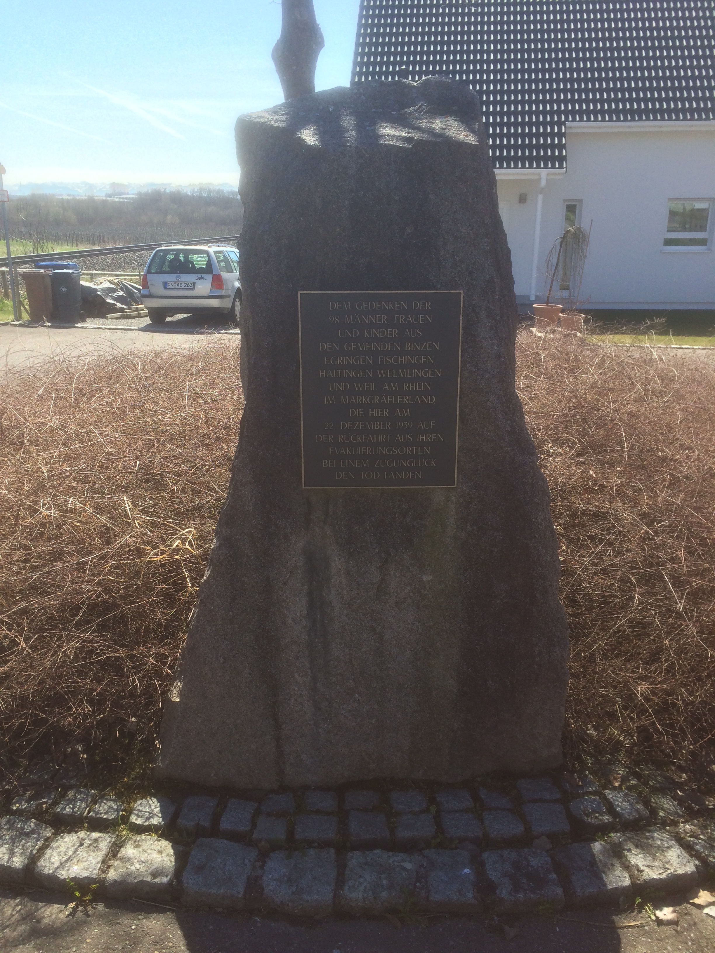 Gedenkstein für das Eisenbahnunglück bei Markdorf bzw. Kluftern